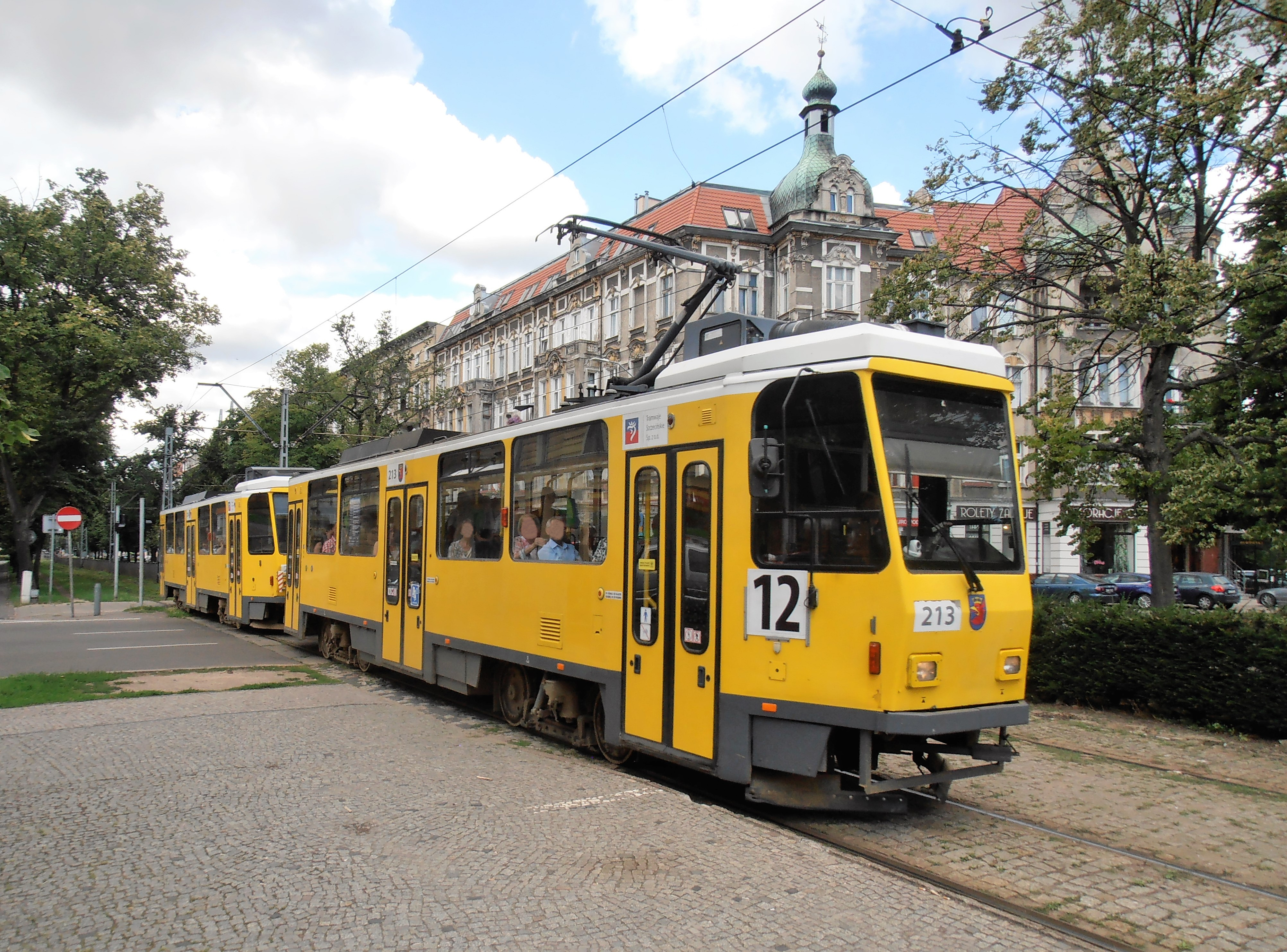 Skład wagonów typu Tatra T6A2D na placu Grunwaldzkim w Szczecinie, 2018